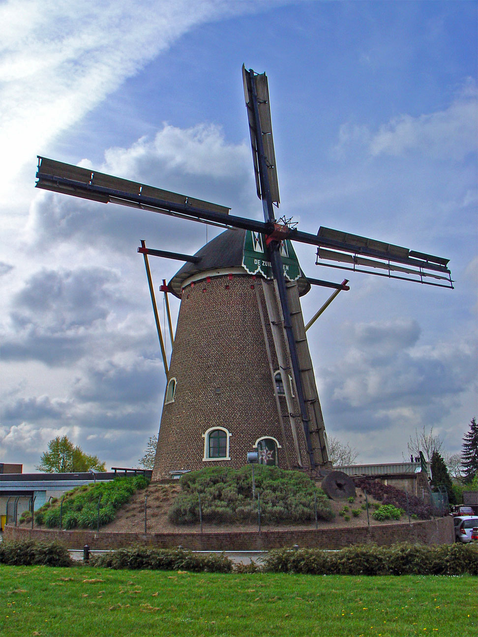 Zuidmolen van Groesbeek Gelderland, Nl. see De Zuidmolen